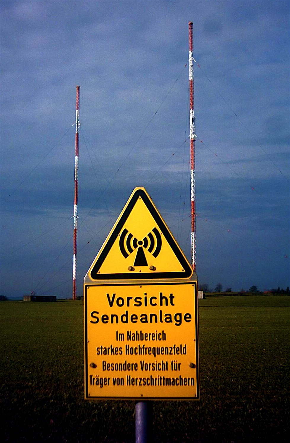 100kw Sendeanlage für den Deutschlandfunk in Horgenzell bei Ravensburg („Sender Ravensburg“) Vorsicht Sendeanlage. Im Nahbereich starkes Hochfrequenzfeld. Besondere Vorsicht für Träger von Herzschrittmachern